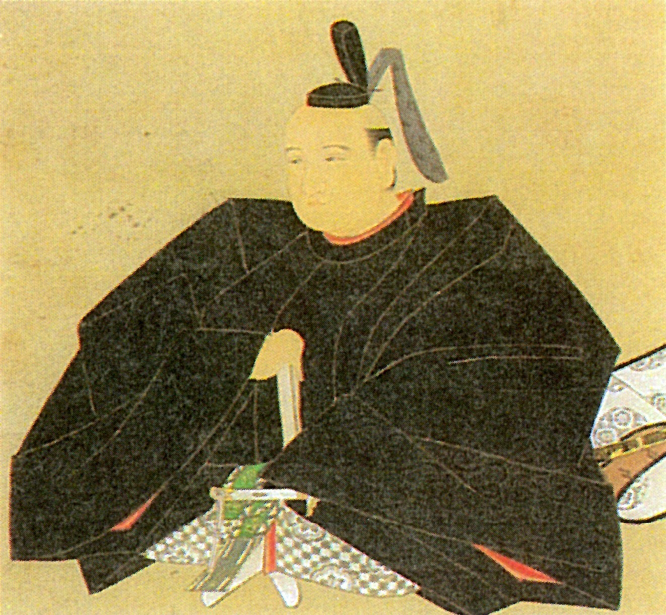 松平綱隆の肖像。